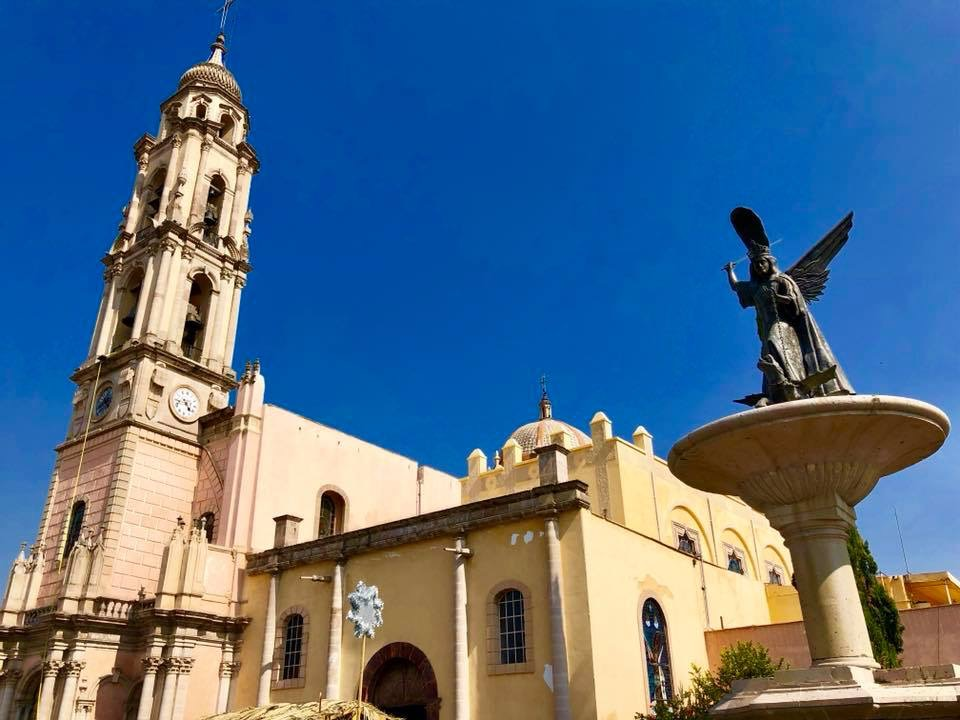 Uriangato Gto.